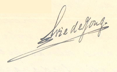 Arie de Jong's signature